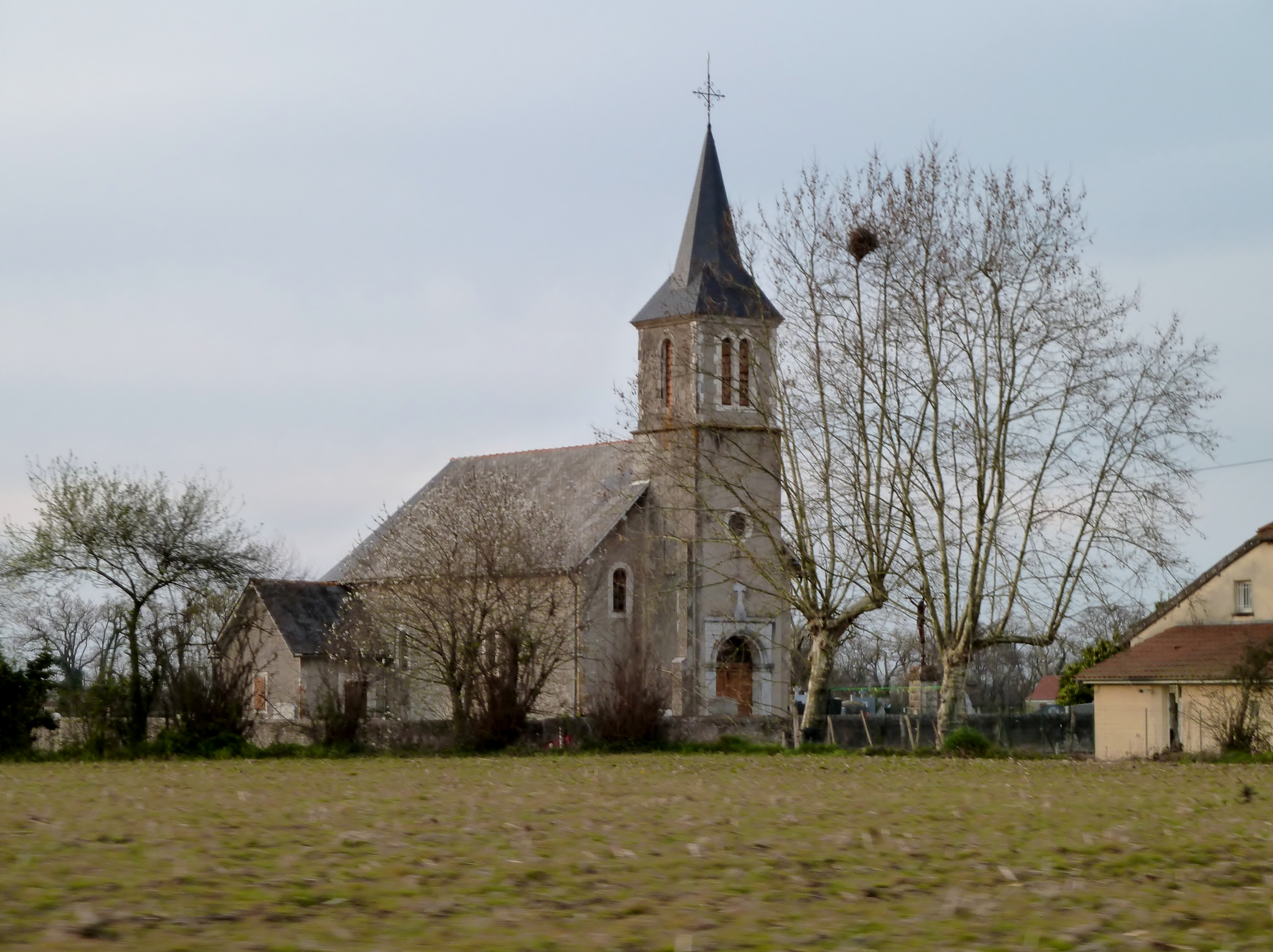 Église de Coublucq